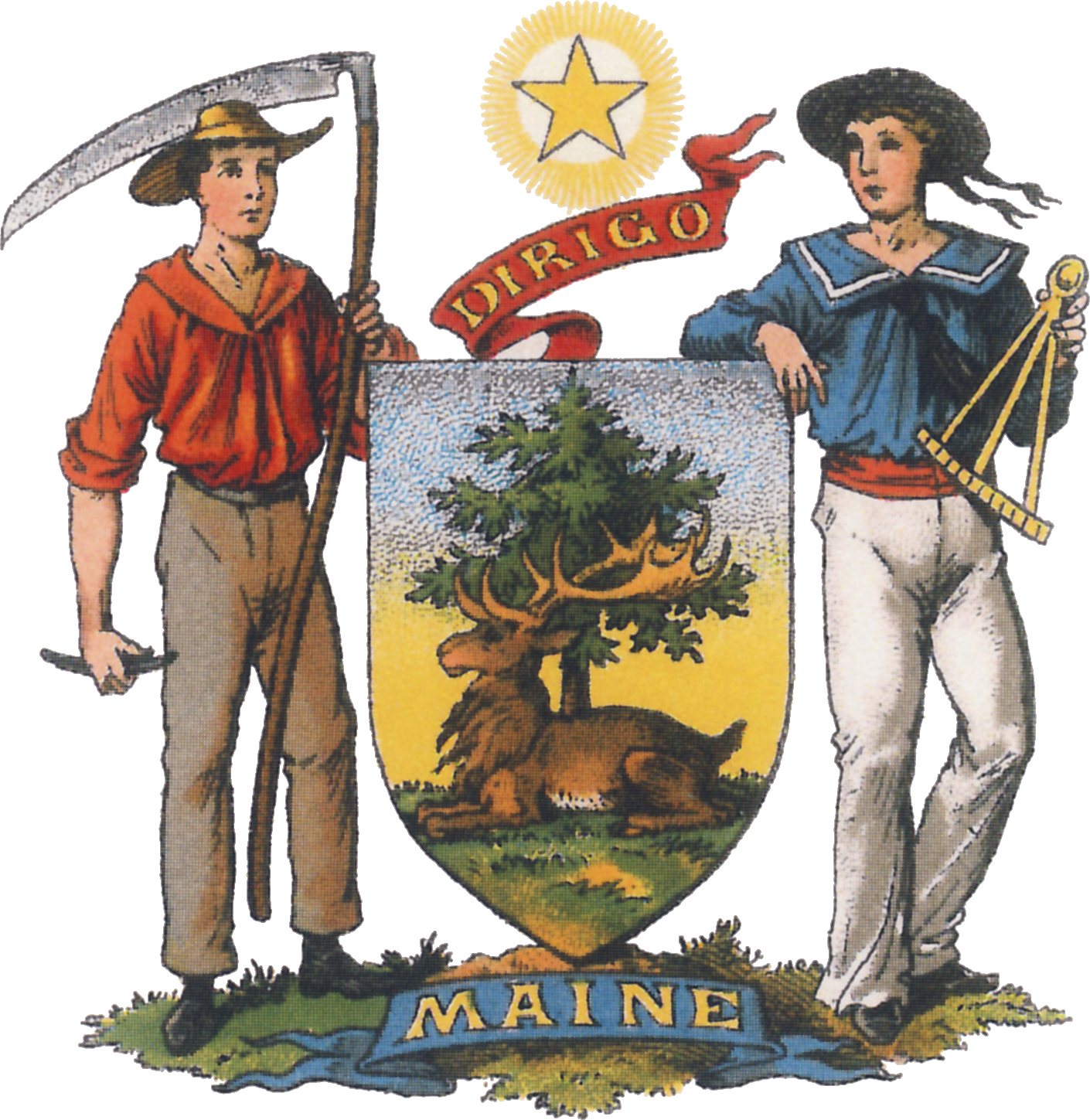 Wappen des US-Bundesstaates Maine